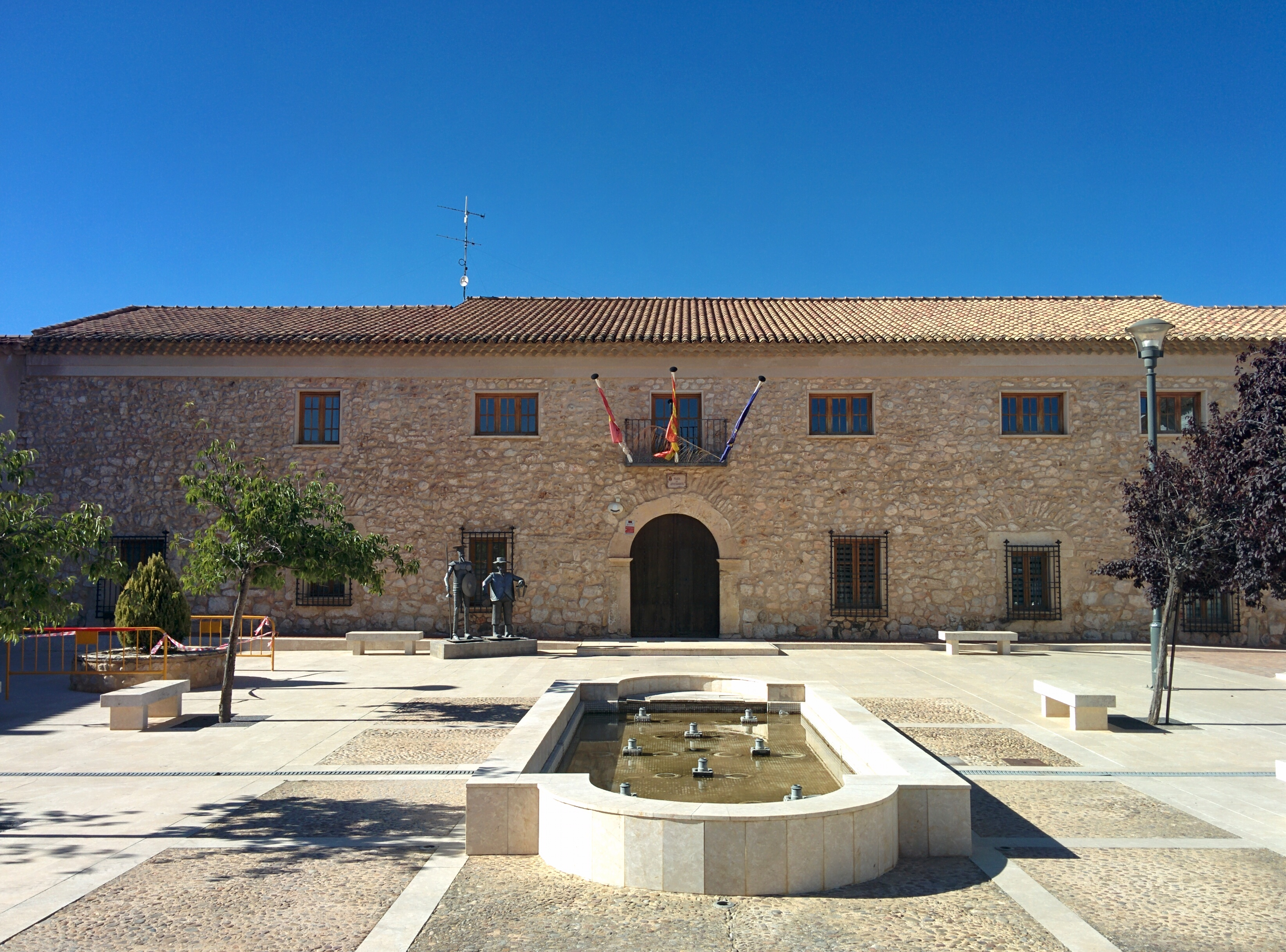 Ayuntamiento de El Pedernoso (Cuenca, España).